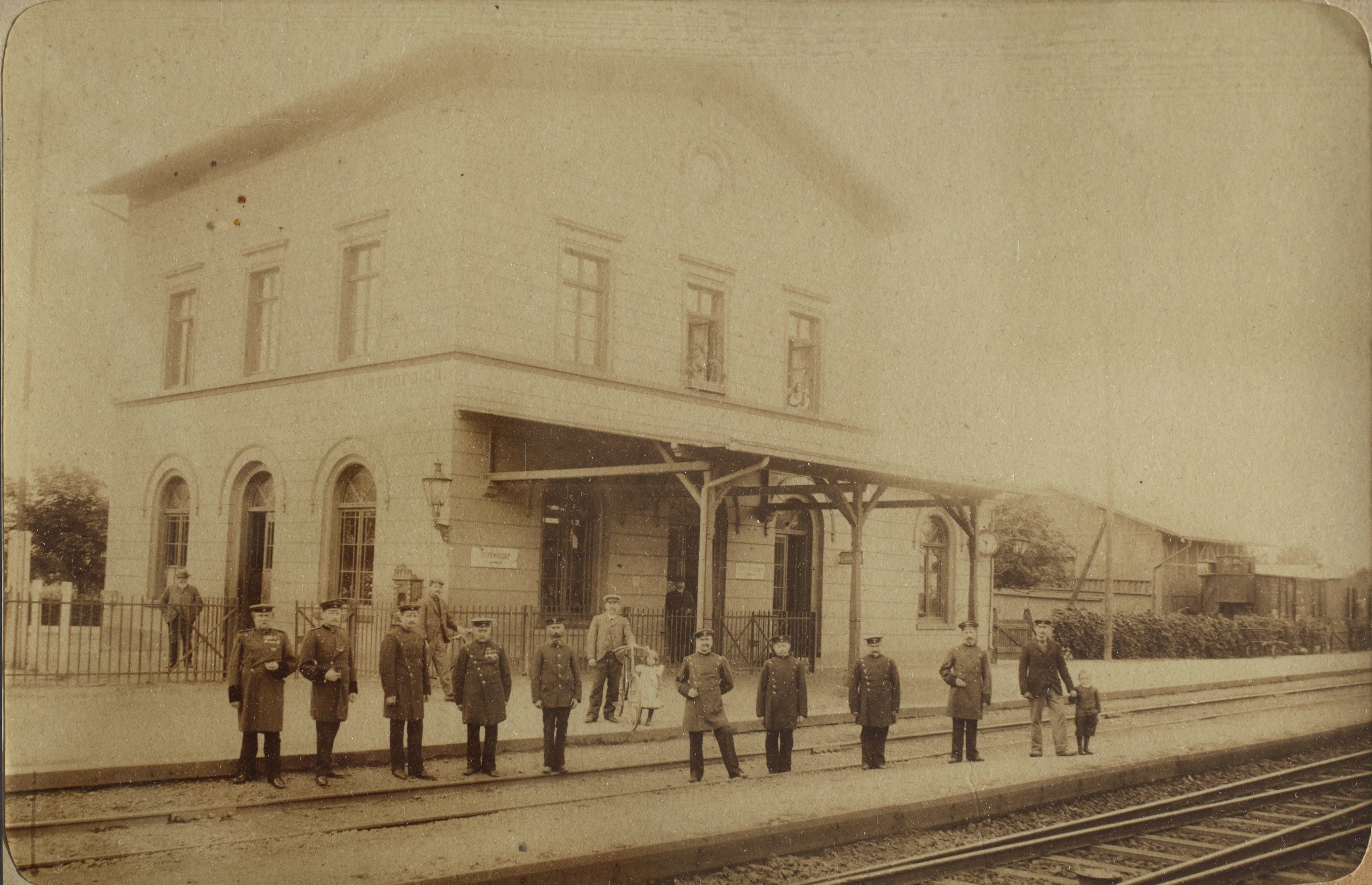 Bahnhof Kleinenbroich: Bahnpersonal vor dem Bahnhofsgebäude Anfang des 20. Jahrhunderts